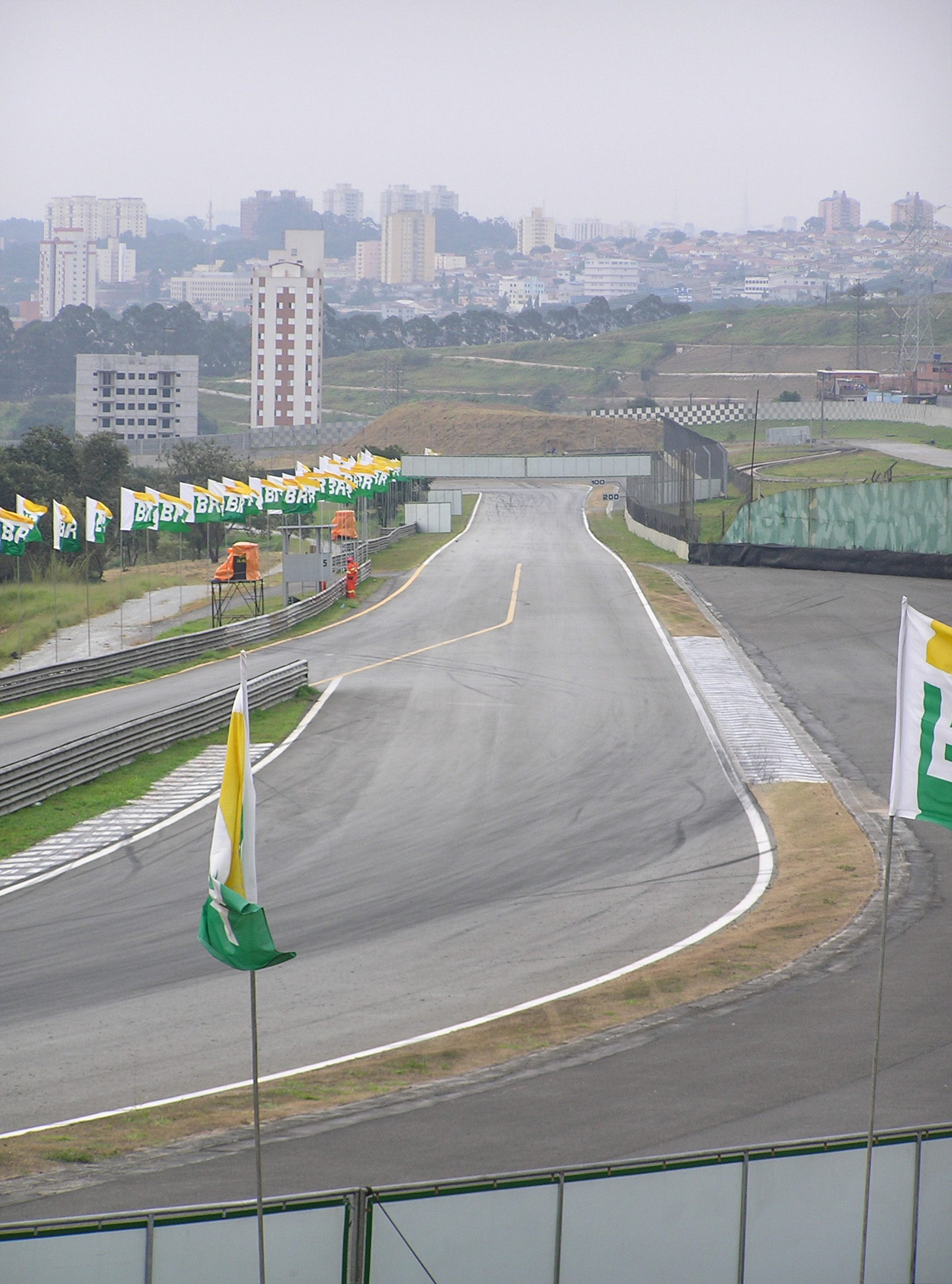 Autódromo José Carlos Pace: Reta Oposta